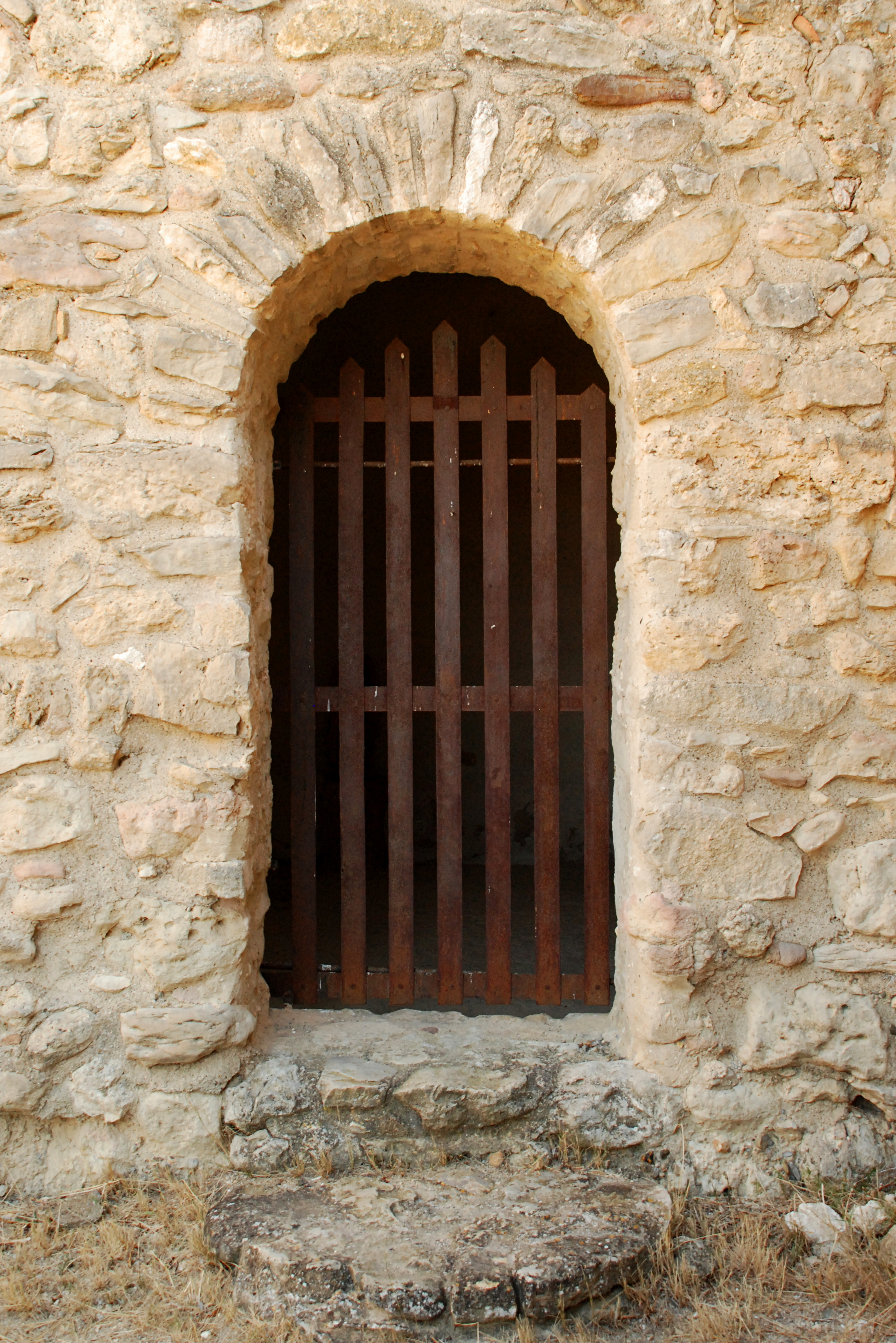 France - Languedoc - Aude - Moussan - chapelle Saint-Laurent (préroman) .